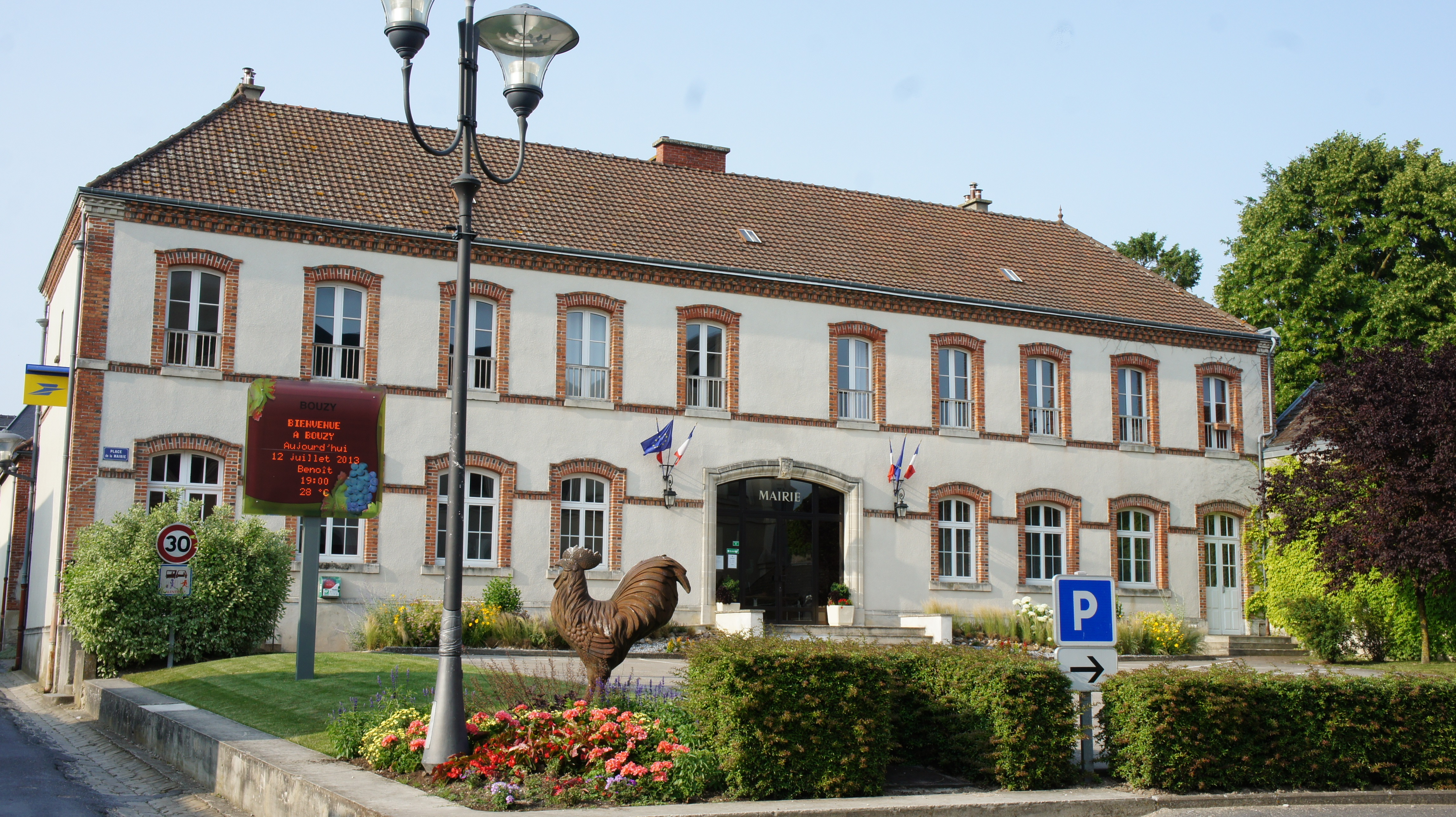 vue de la Mairie .